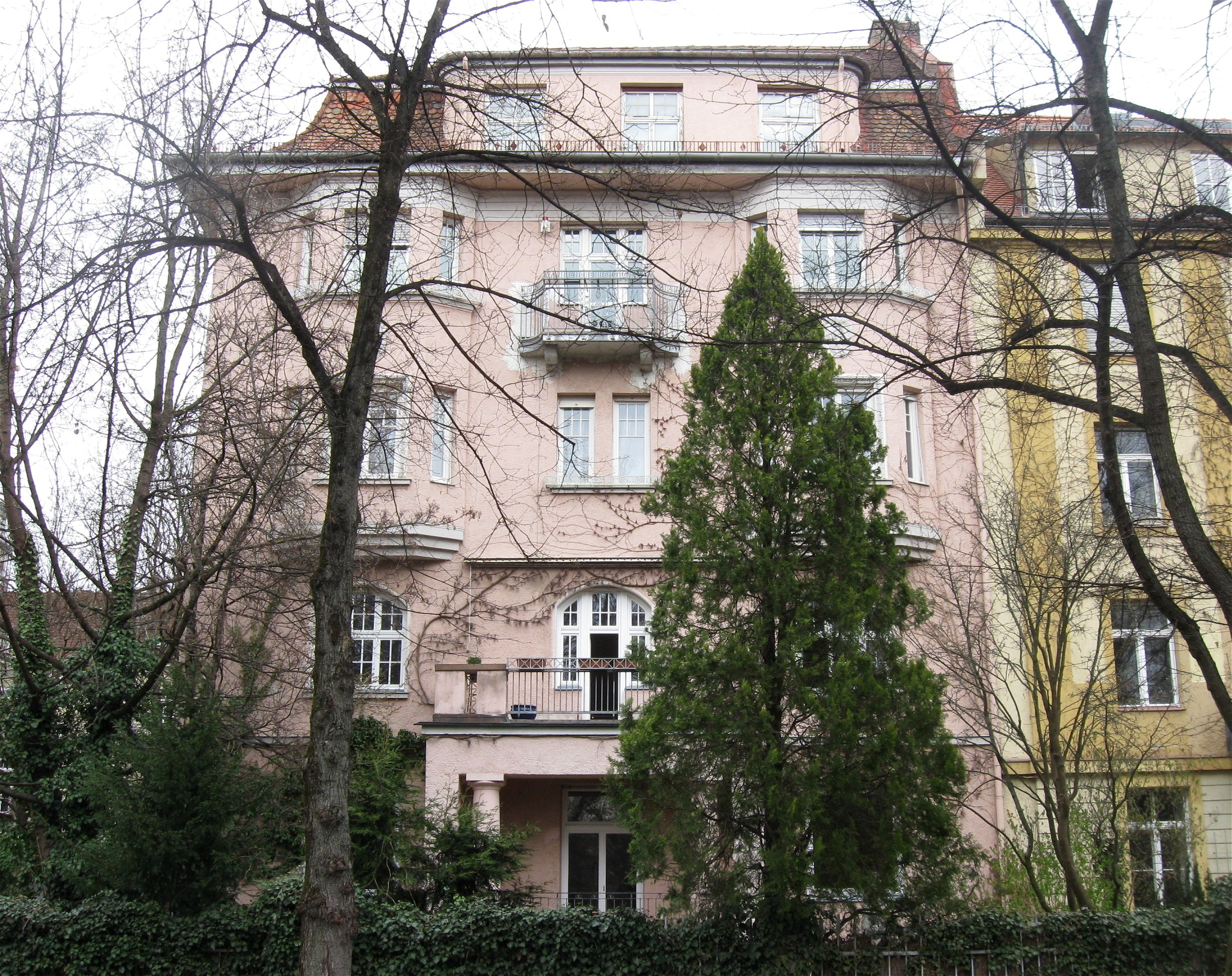 Adalbertstraße 100; Mietshaus, klassizistischer Jugendstil, um 1911 von Max Neumann.